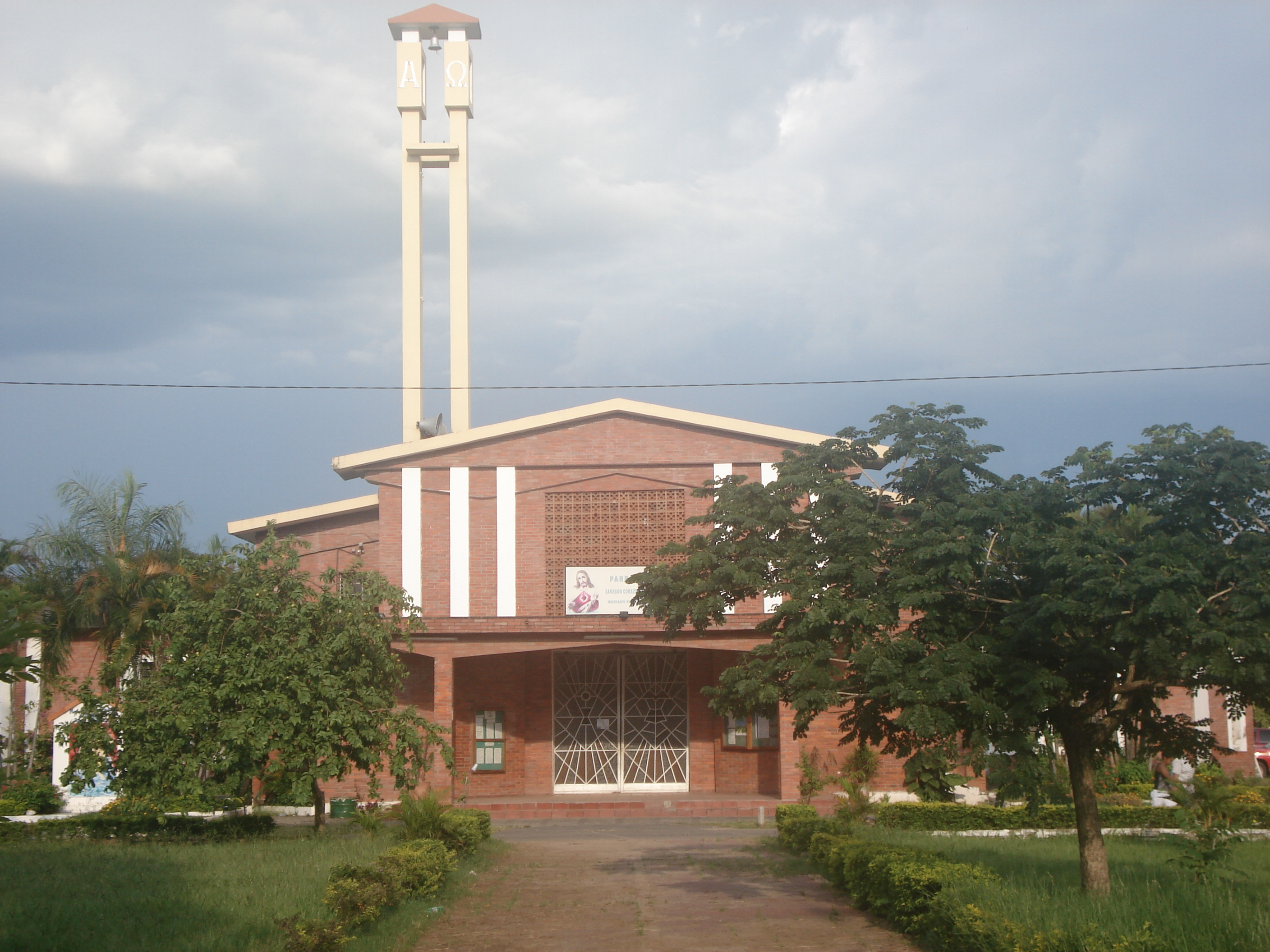 fachada